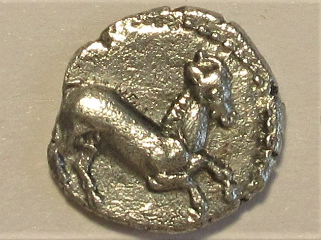 Obol aus Kelenderis, Avers mit Pferd, um 350-370 v. Chr.